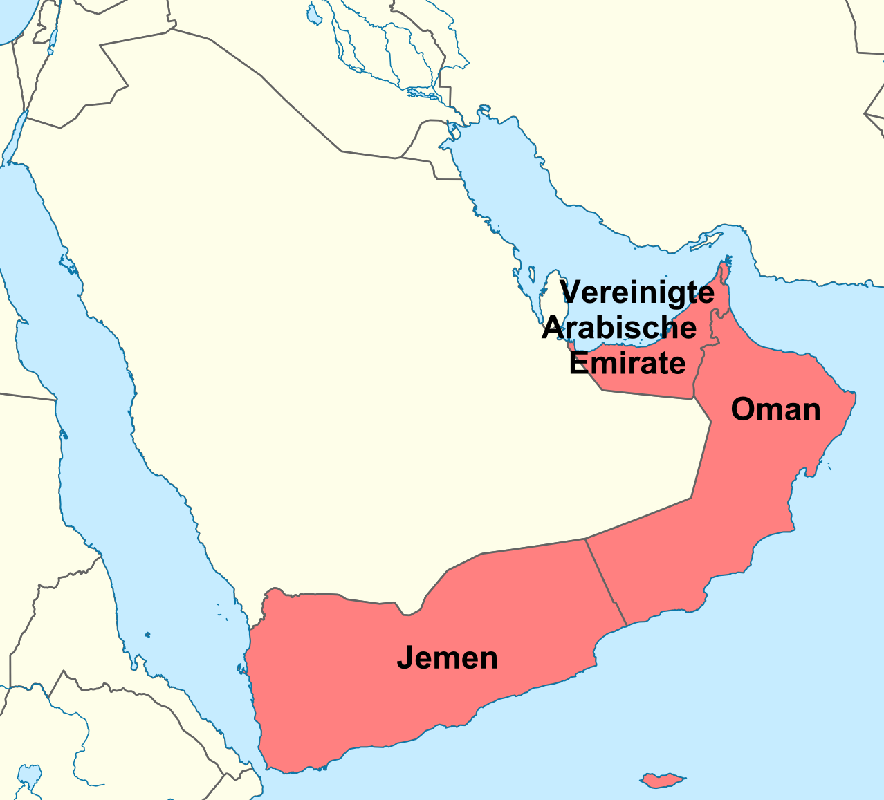 Apostolisches Vikariat Südliches Arabien